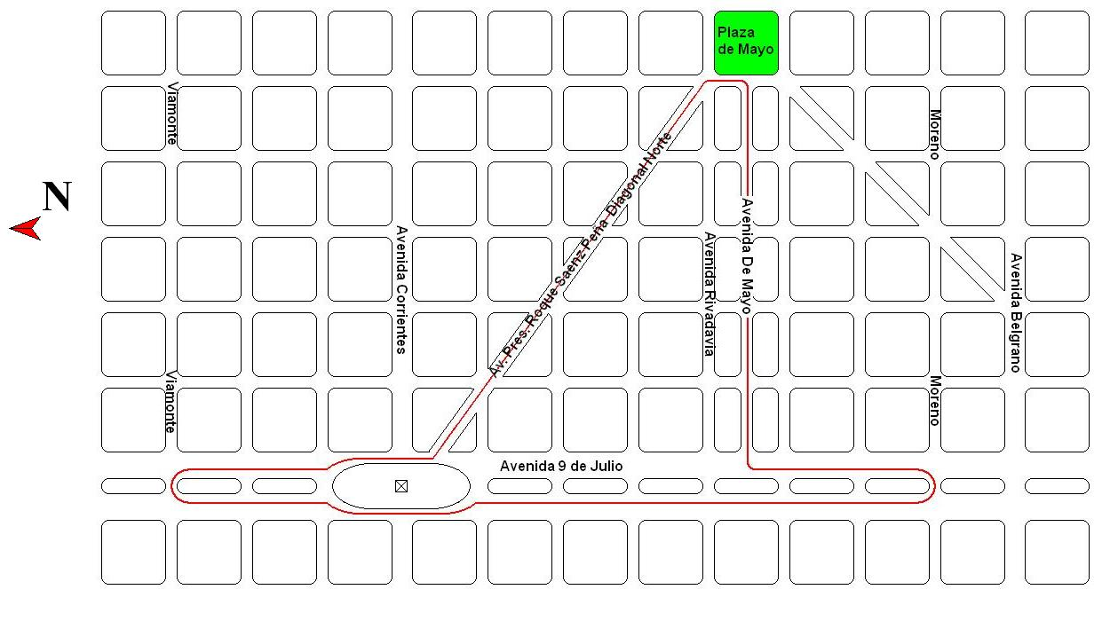 Croquis de diseño propio, que señala el diseño del nuevo Circuito Callejero montado en las calles de la Ciudad de Buenos Aires